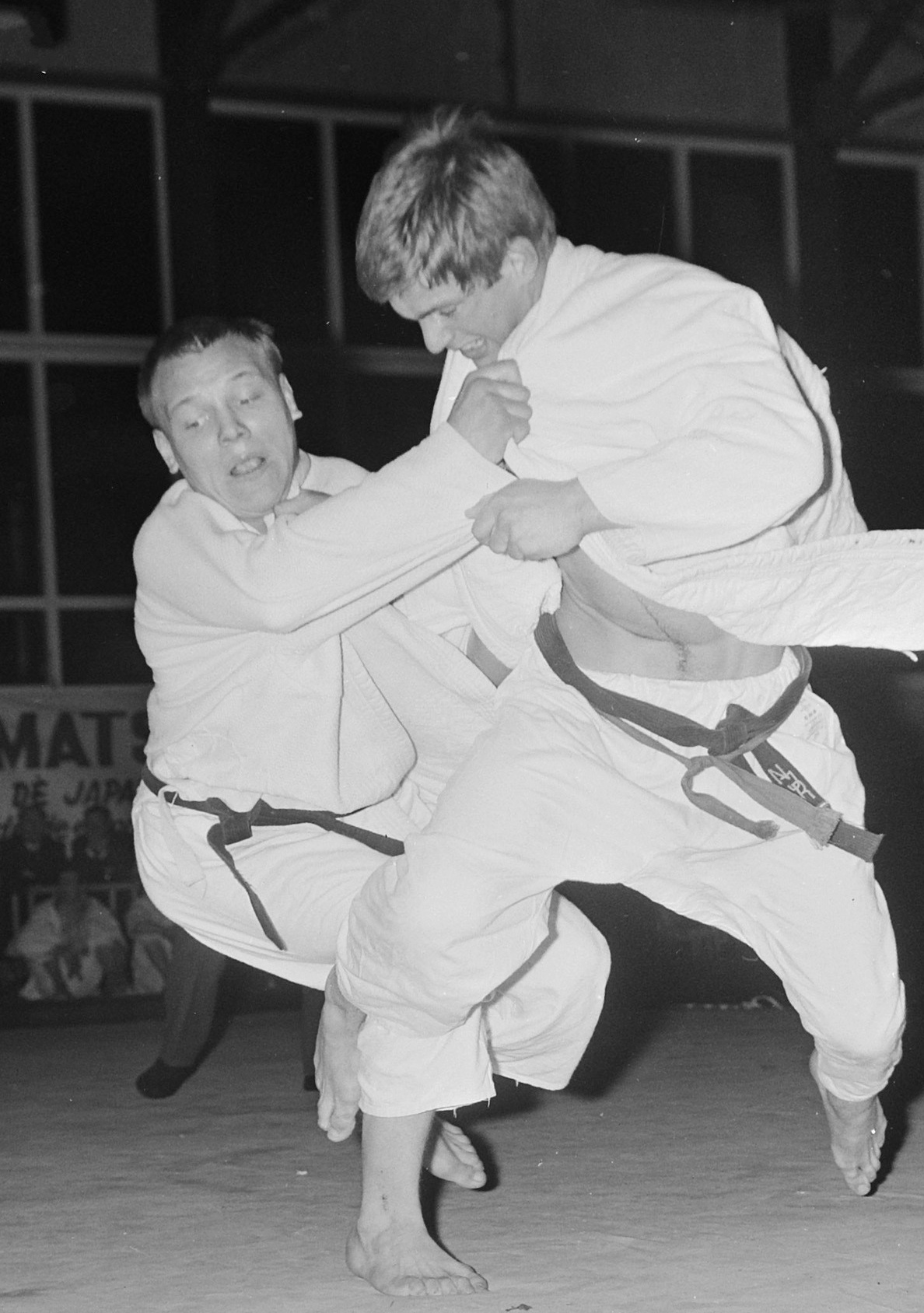 Judo, Nederland tegen Engeland te Den Haag., Brian Jack (l) in duel met A. van Polanen